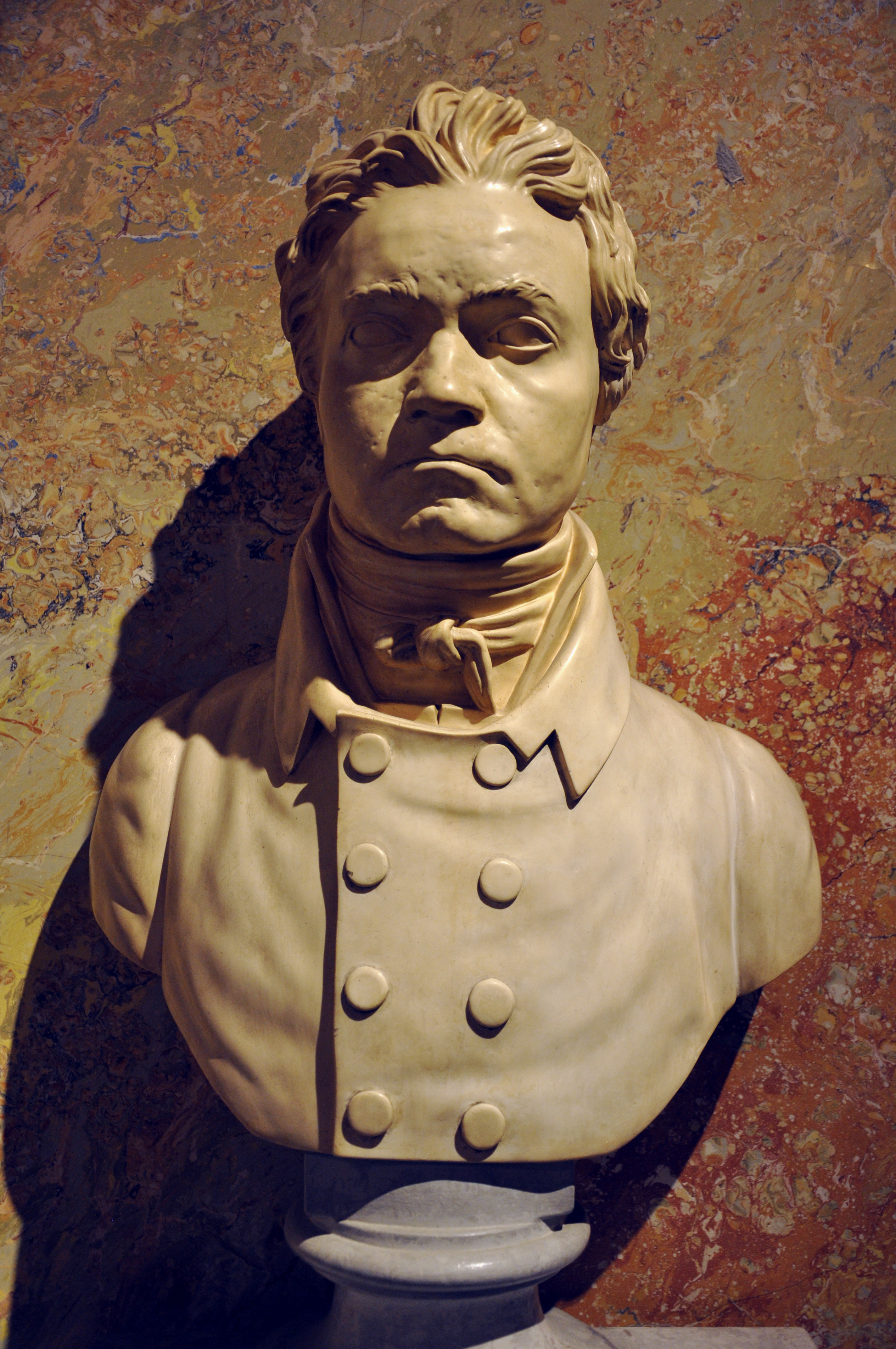 Wien, Kunsthistorisches Museum, Sammlung alter Musikinstrumente (Neue Burg) Büste Ludwig van Beethoven, Bildhauer: Franz Klein, Wien, 1812